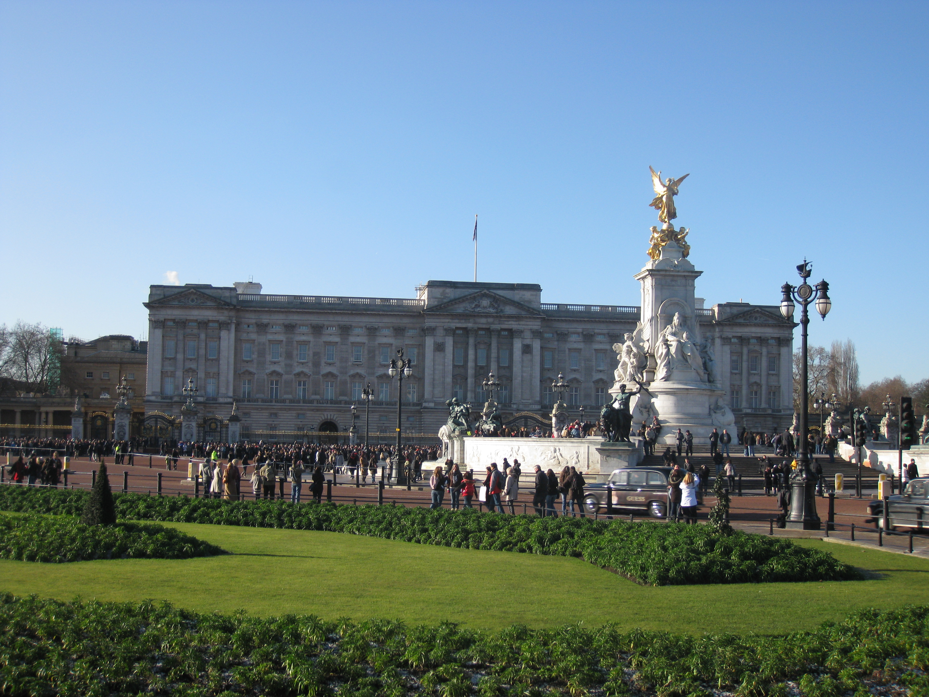 Buckingham Palace חזית ארמון בקינגהאם ואנדרטת ויקטוריה